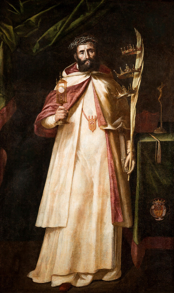 La obra representa a San Ramón Nonato (1204-1240), religioso de la Orden de la Merced.